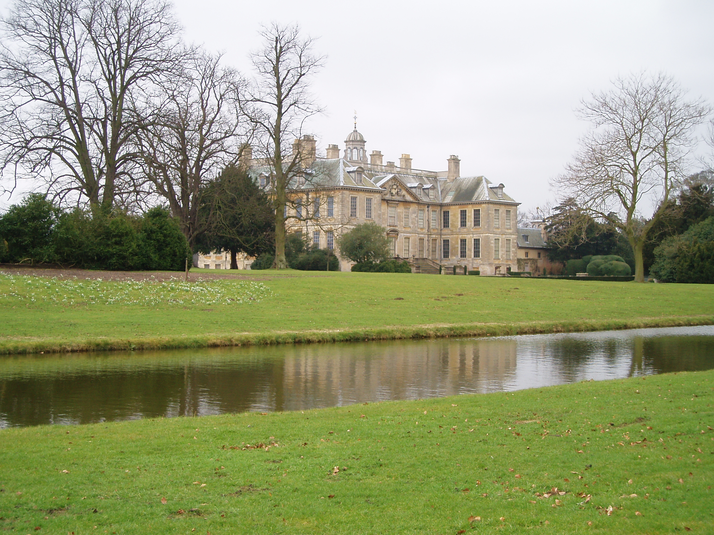 Belton House